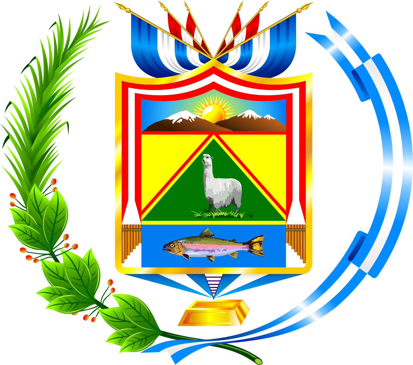 Distrito de Santa Lucía - Provincia de Lampa - Región puno